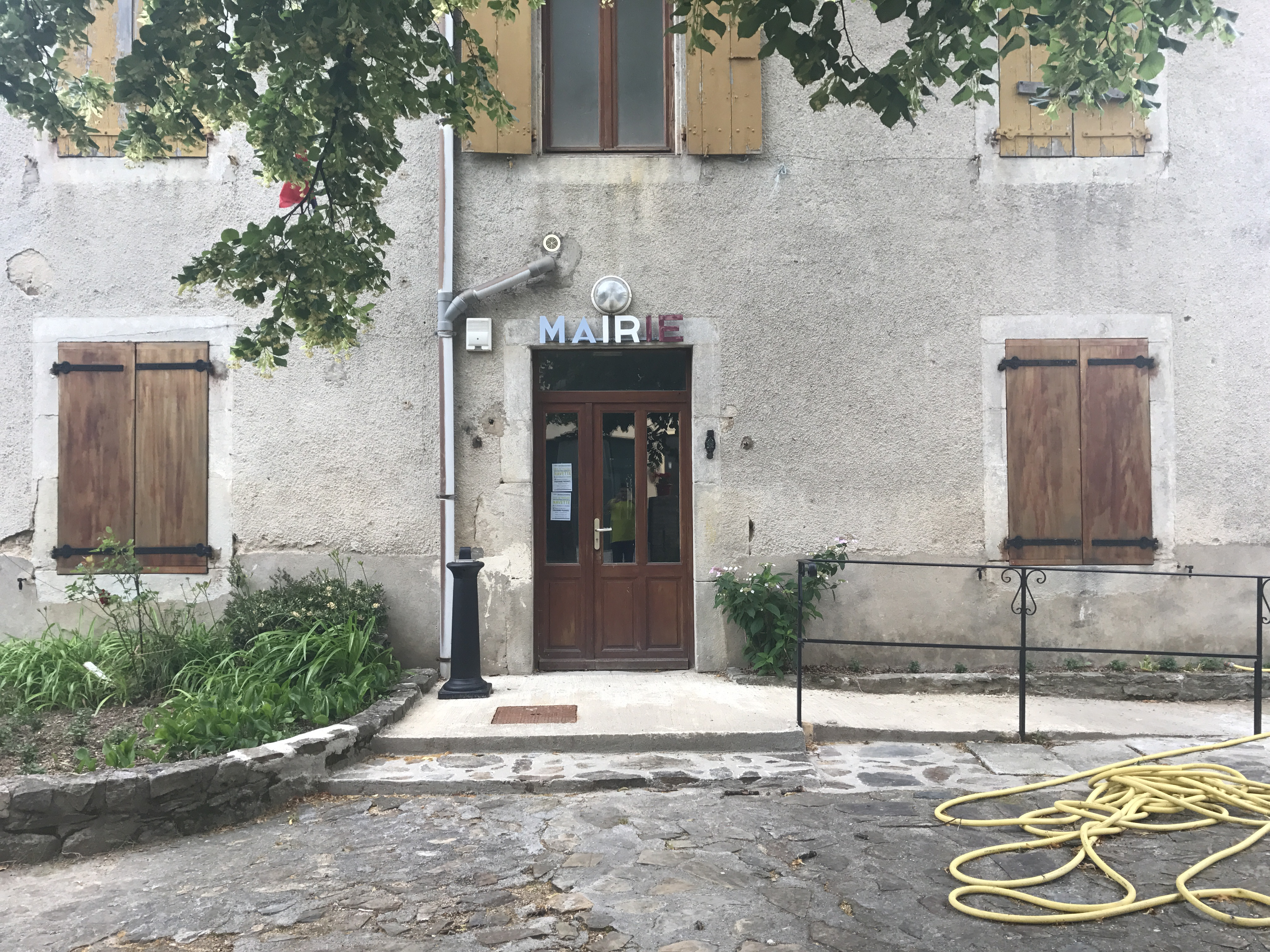 Image du village de Saint-Cierge-la-Serre, dans l'Ardèche, en France.